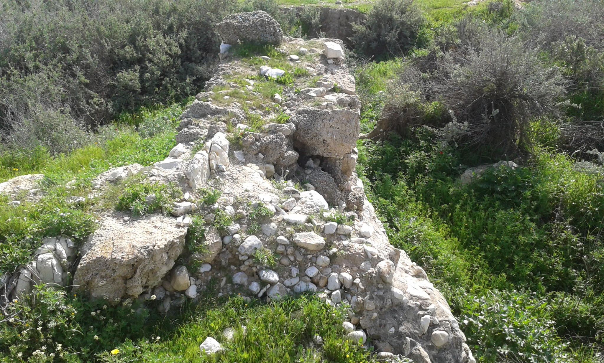 החפירות הארכיאולוגיות בתל א-שריעה